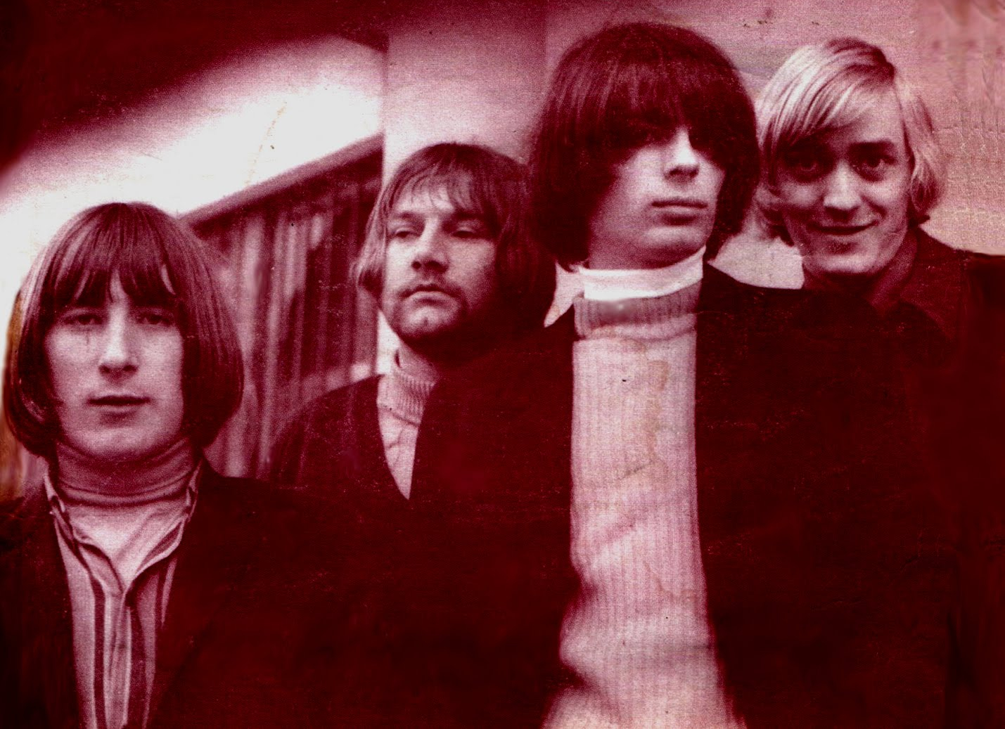 Skupina Kameleoni na naslovnici plošče Sunny Cry.